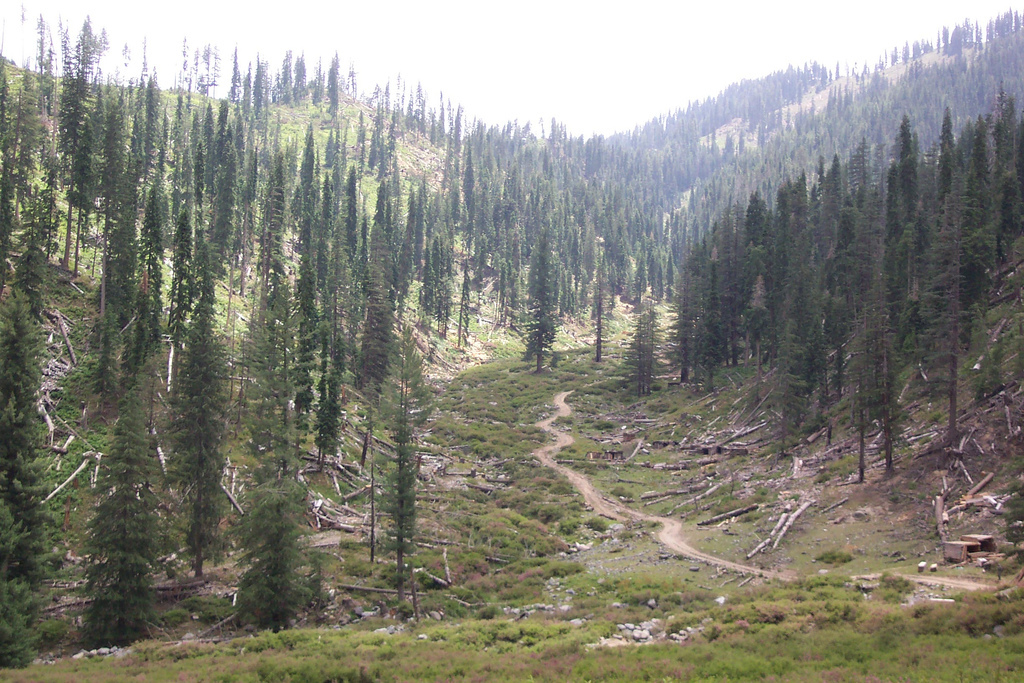 Zuliyal, Korengal Valley, Kunar Province, Afghanistan.